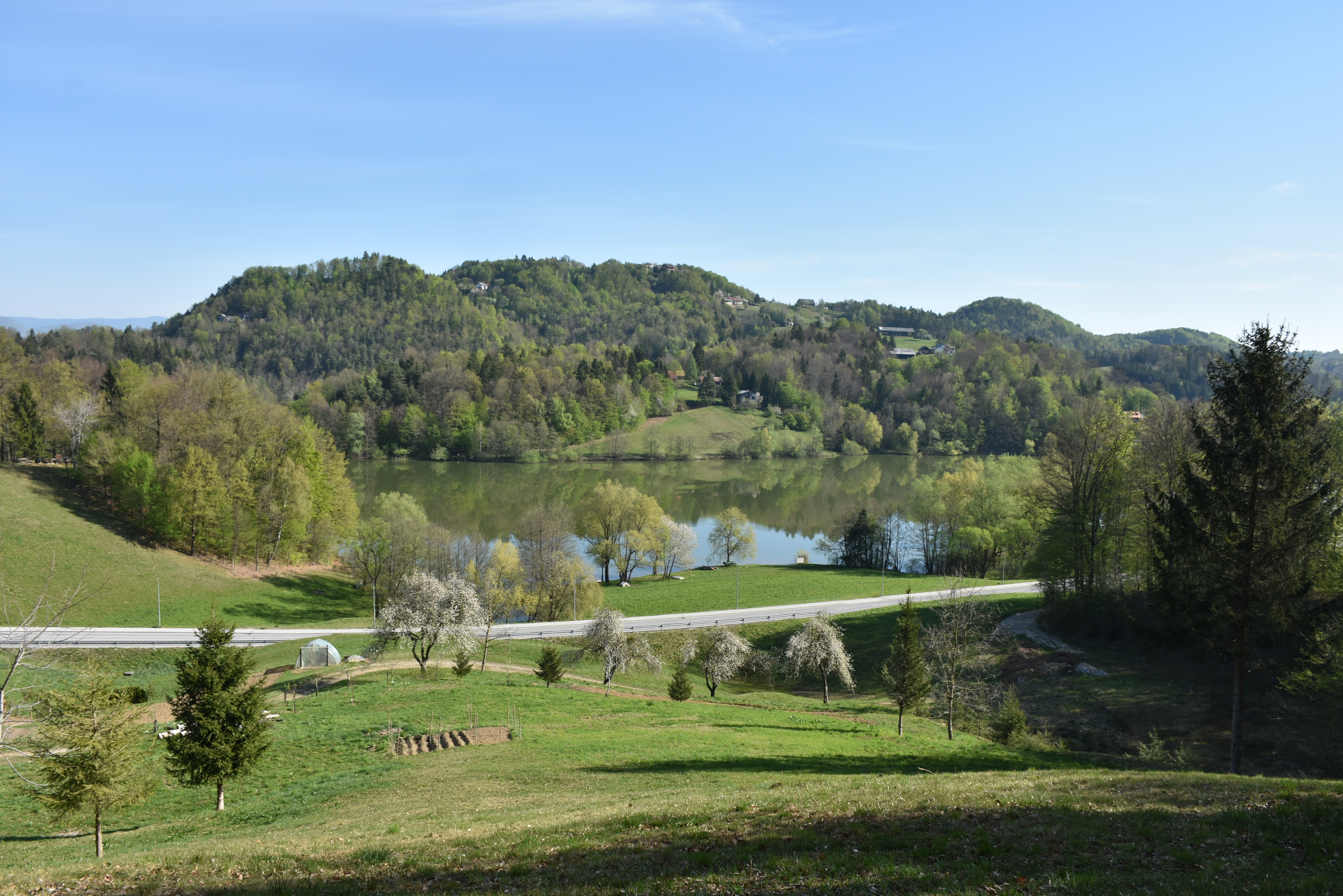 Slivniško jezero, Slivnica Lake, Slovenia